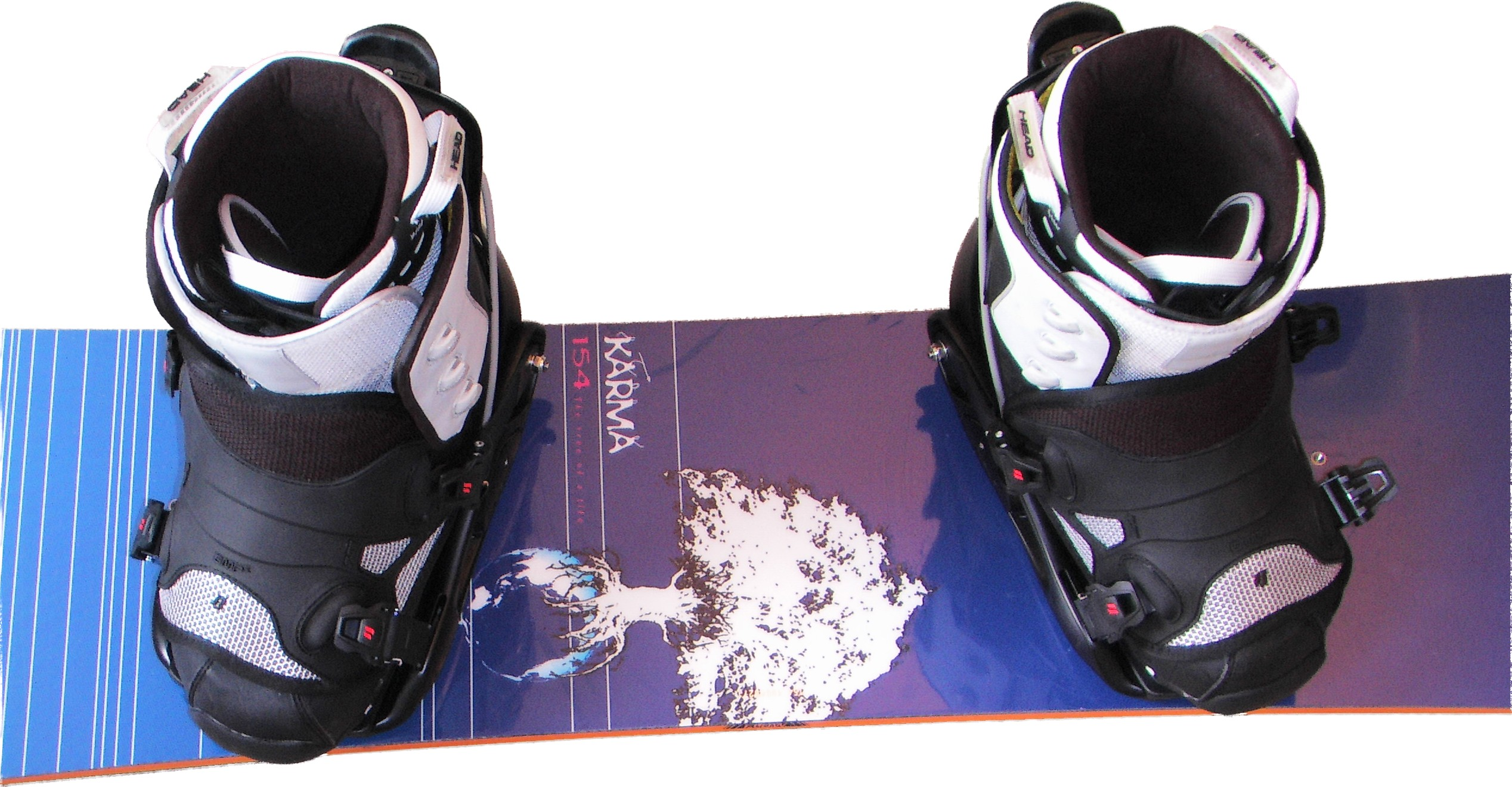 Snowboard mit Bindungswinkel 21°/-21° (Duckstance)